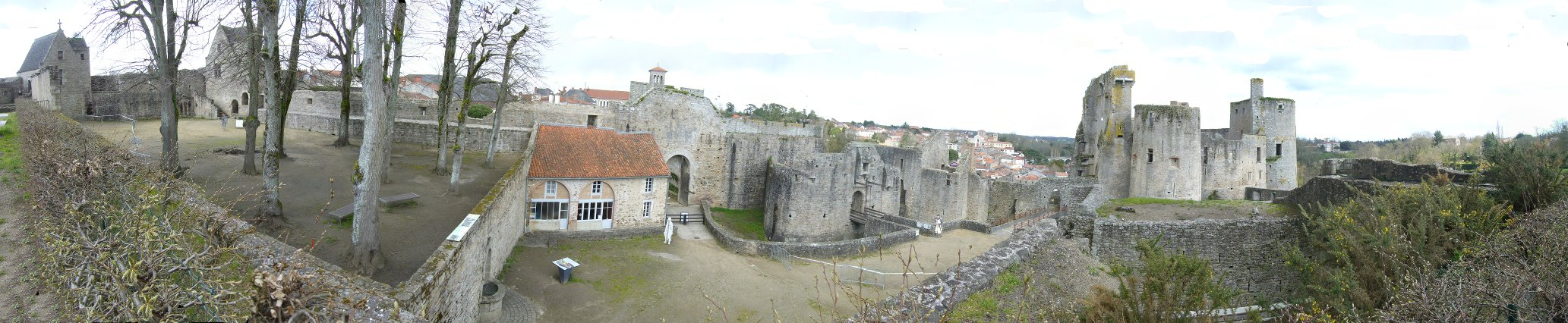 Vue panoramique du Chateau de Clisson